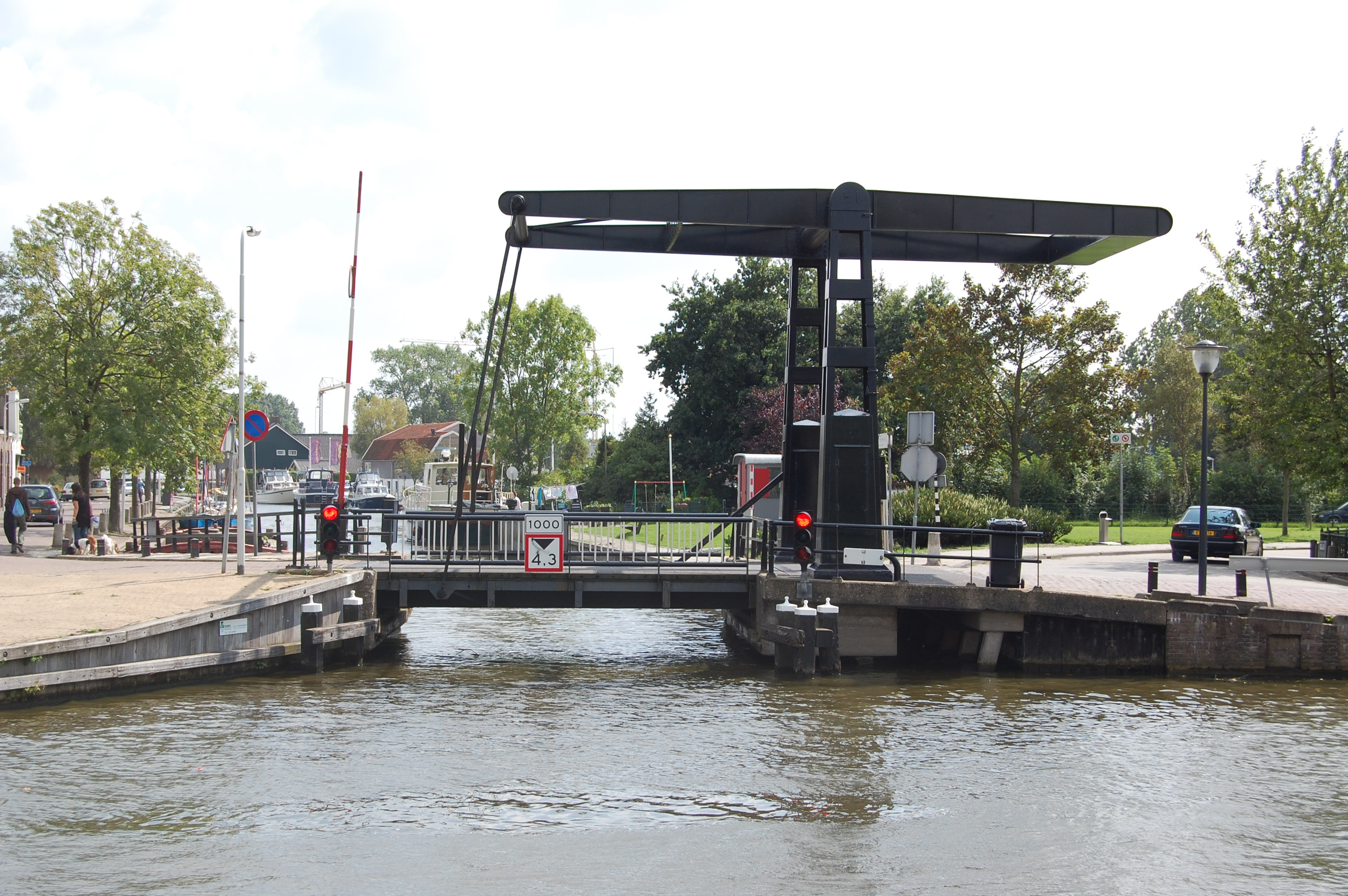 De Woudvaartbrug te Sneek in de verbinding tussen de Stadsgracht en de Woudvaart